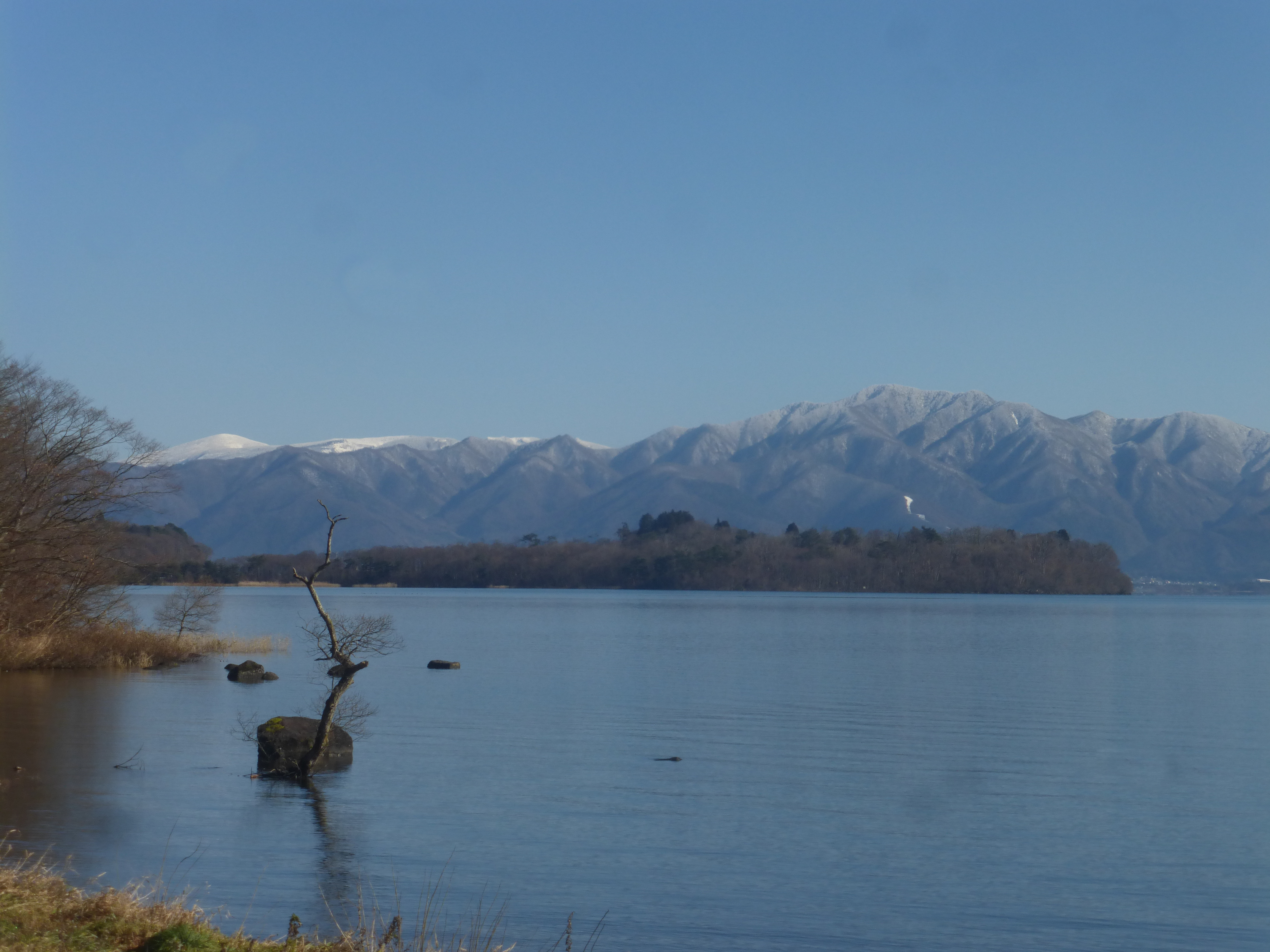 翁島（おきなじま, Okina-jima） Panasonic Lumix DMC-TZ35